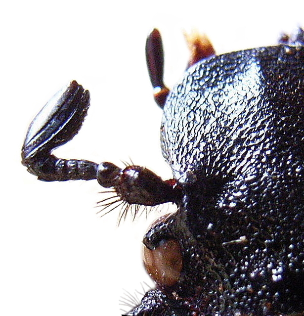 entenna of a female Osmoderma eremita